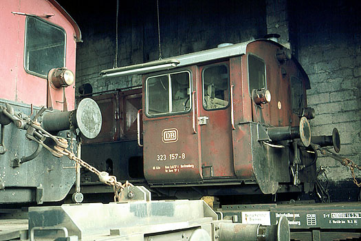 Kleinloks der Baureihe 323 auf Transportwaggons